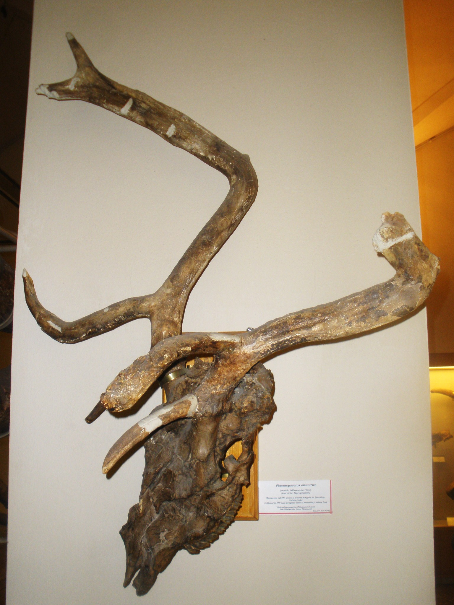 Fossil of Praemegaceros, an extinct mammal- Took the picture at Museo di Paleontologia di Firenze